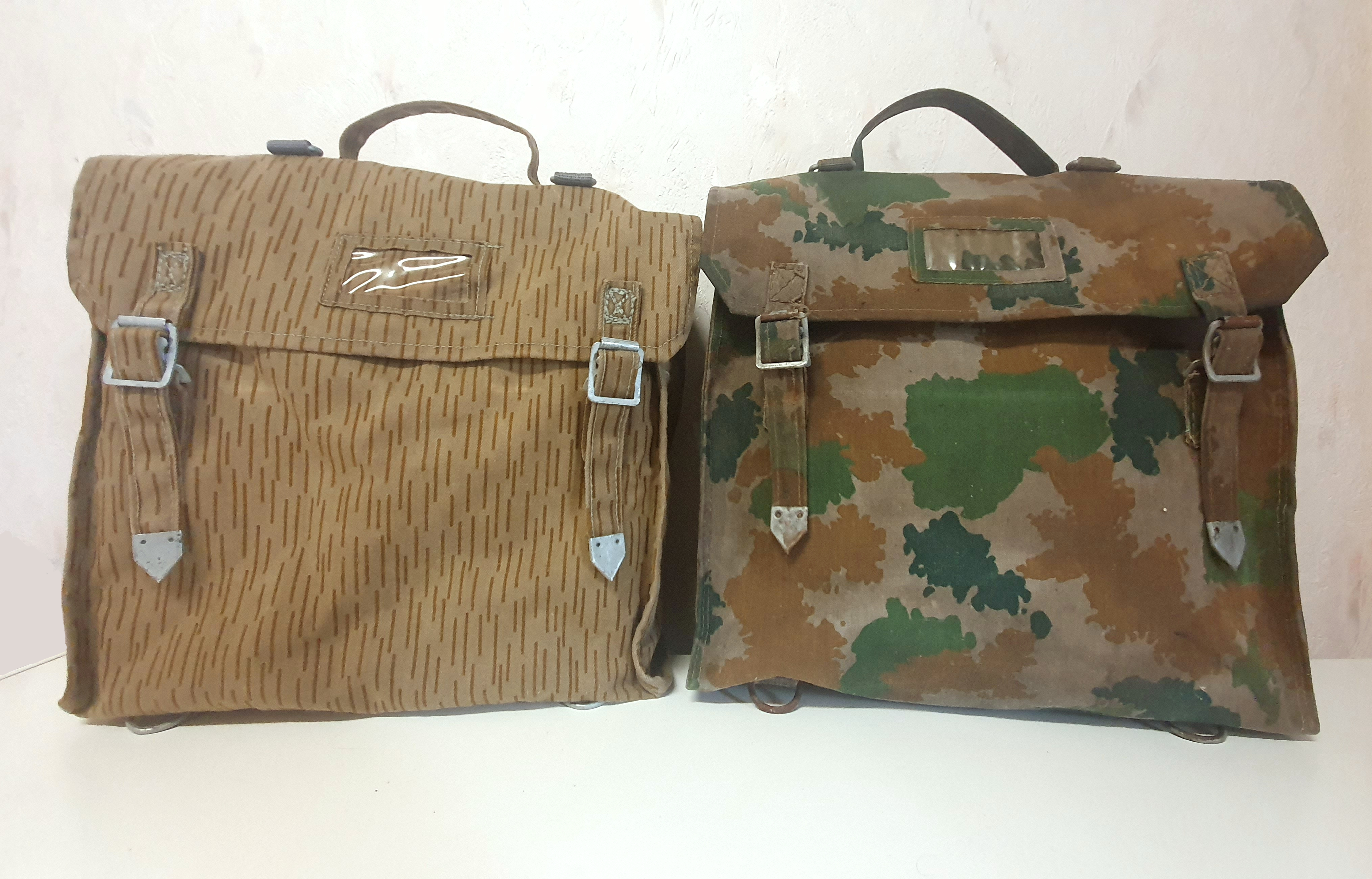 NVA Tarn